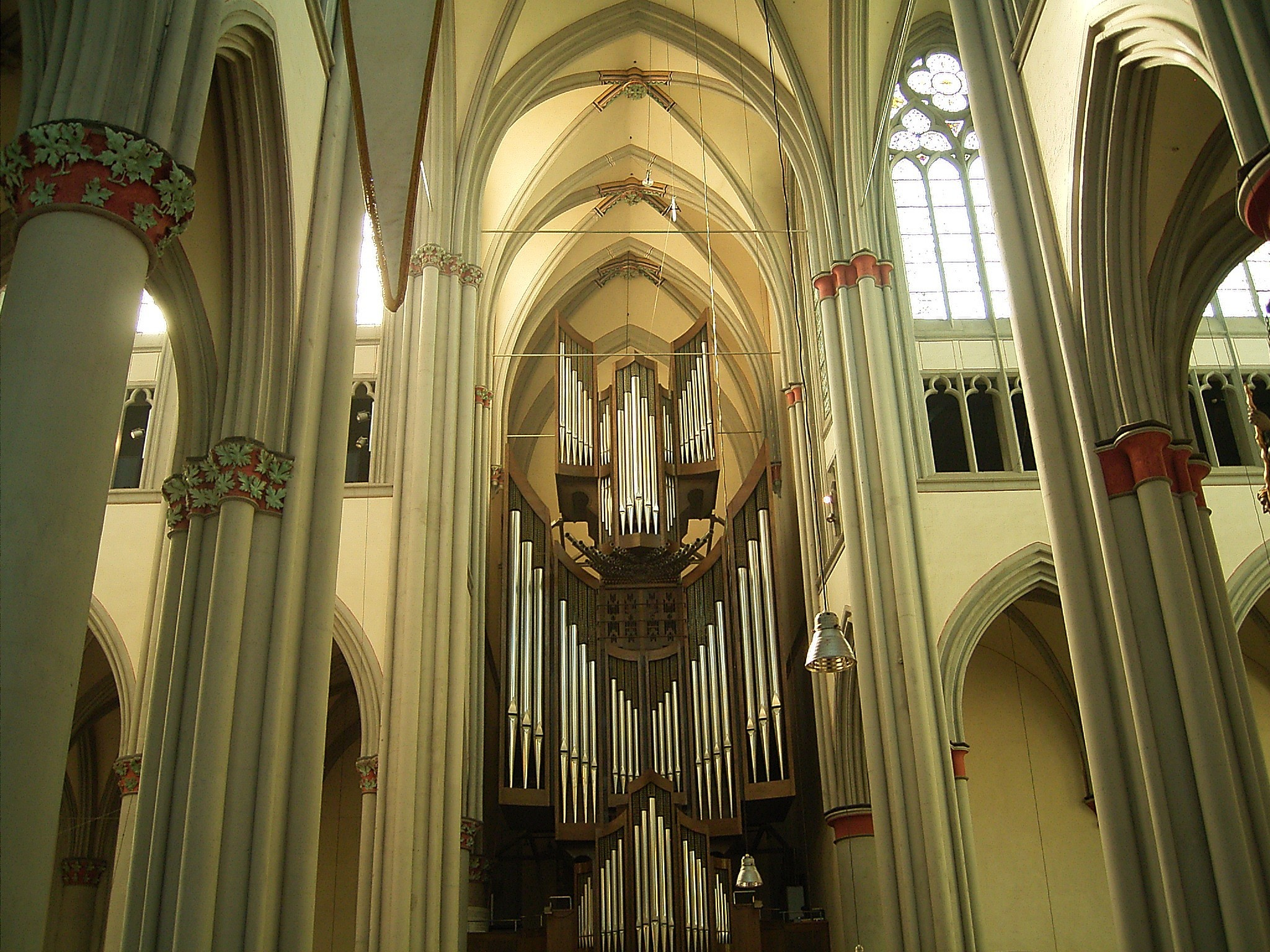 Altenberger Dom in Odenthal